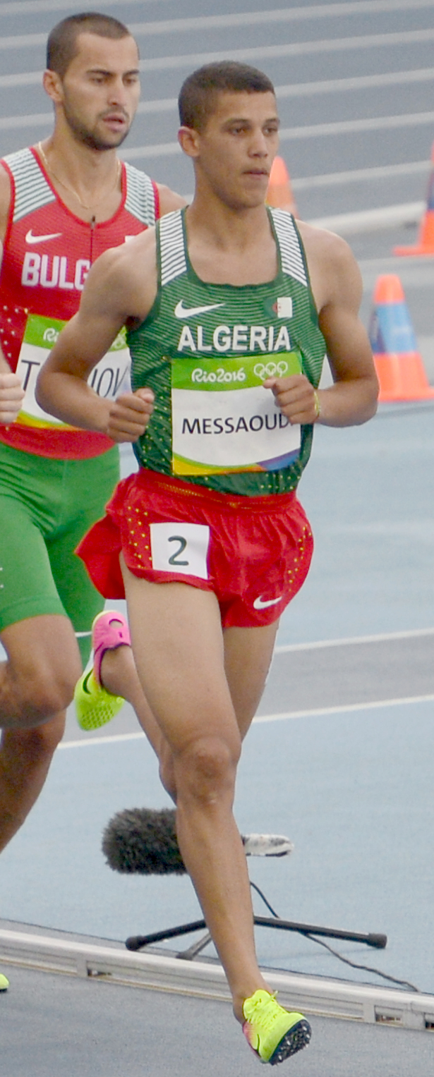 Série du 3000m steeple Homme des JO de Rio, 2016